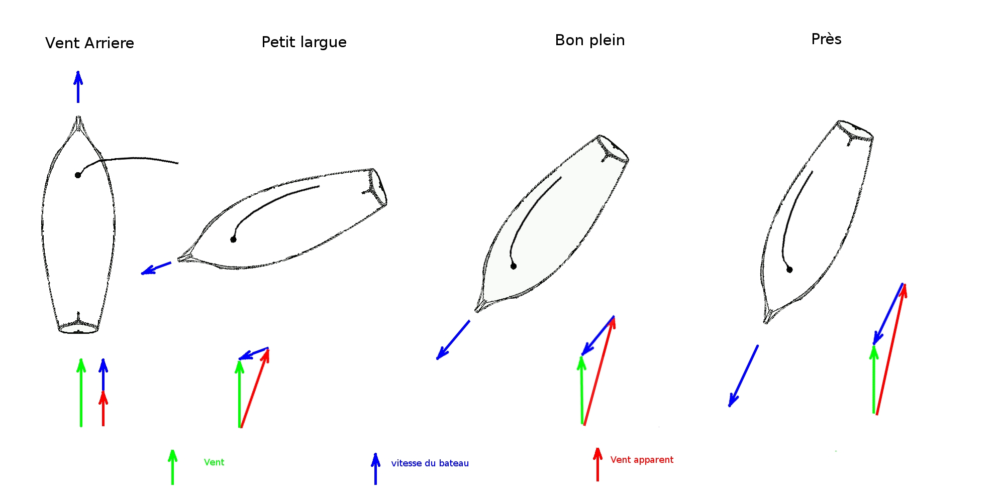 expose les vecteurs vitesse bateau vent et vent apparent suivant les allures du bateau